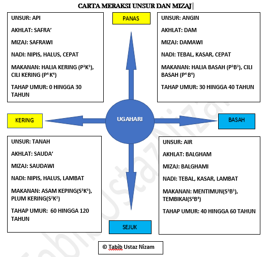 Meraksi Unsur dan Mizaj